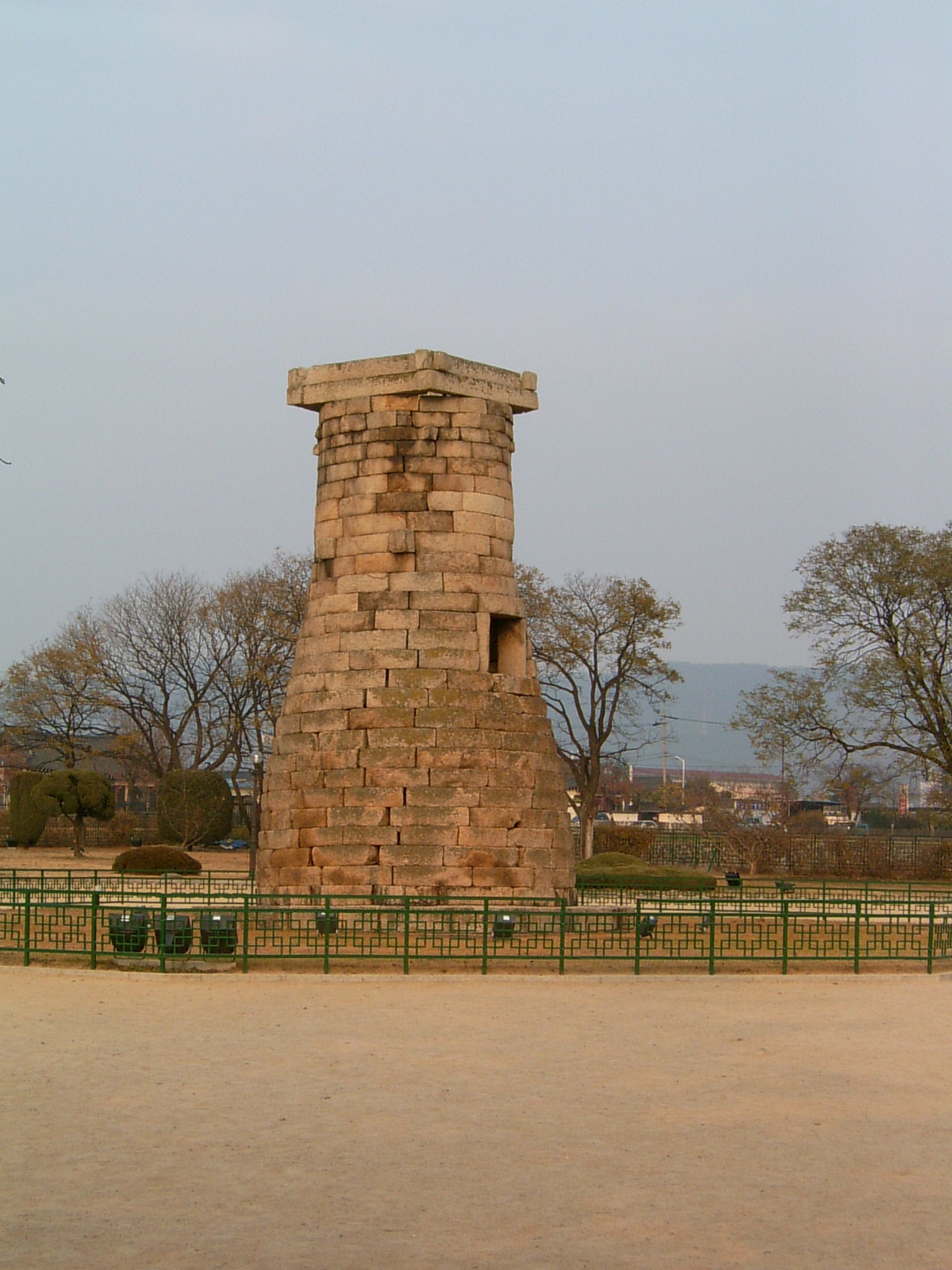 Cheomseongdae in Gyongju, Zuid-Korea. Een van de oudste sterrenwachten in Zuid-Azië. Foto gemaakt in November 2004.